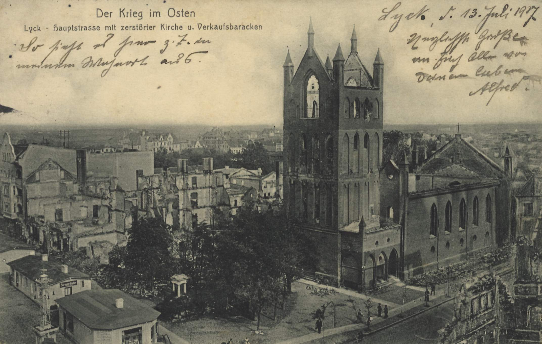 Hauptstraße mit zerstörter Kirche und Verkaufsbaracken